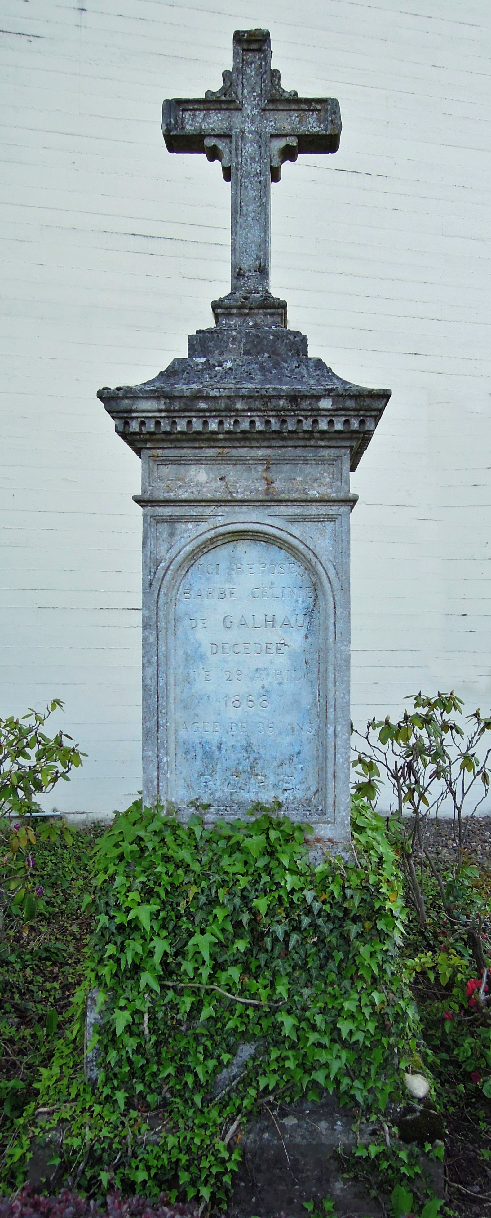 Grabmal Barbe Celinie de Galhau von 1868 auf dem Friedhof